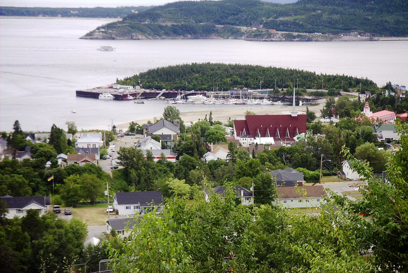 Tadoussac, an der Mündung des Saguenay-Fjord in den St.-Lorenz-Strom